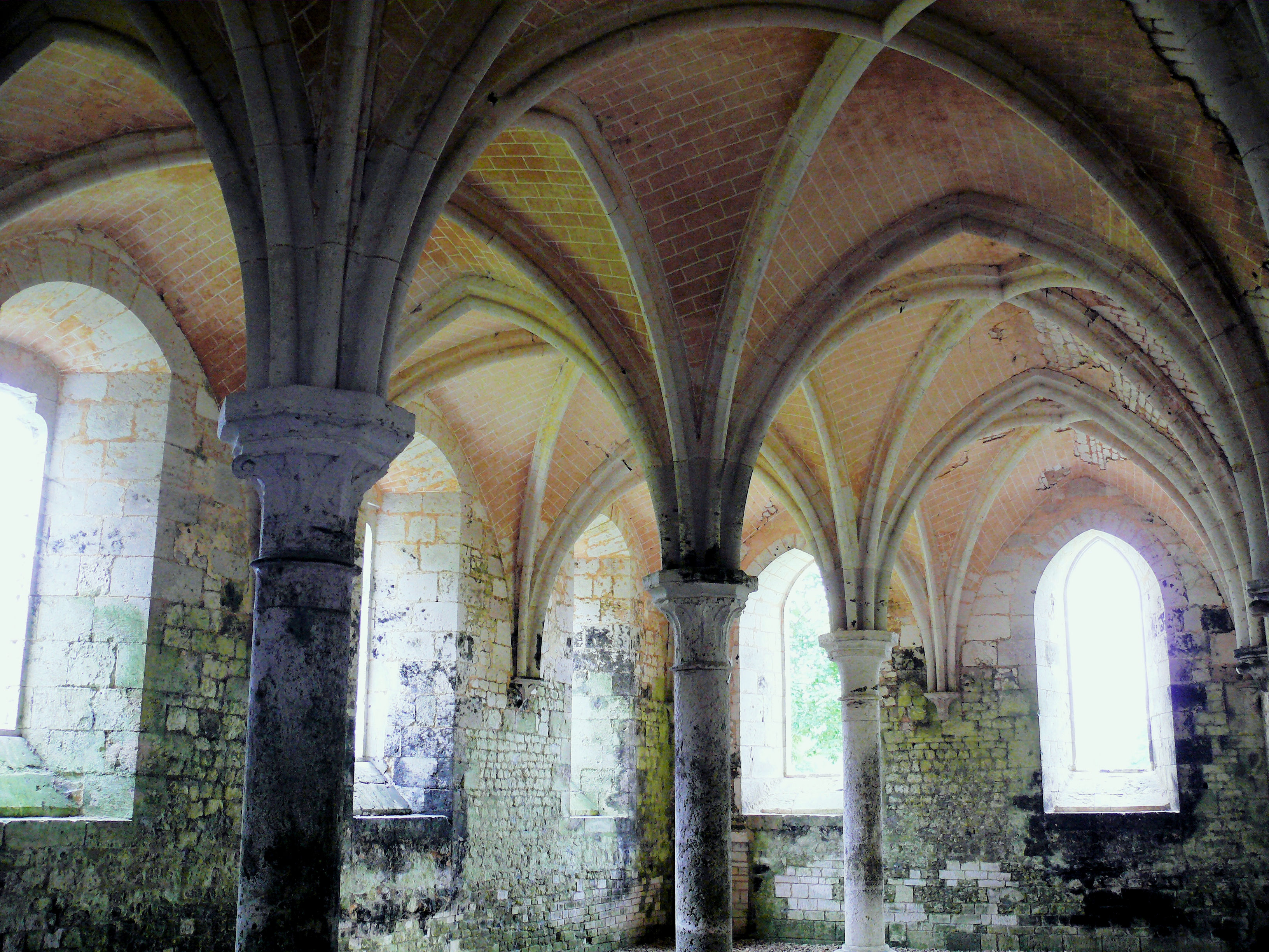 Abbaye Notre-Dame de Fontaine-Guérard - Scriptorium - 27630 Fontaine-Guérard.